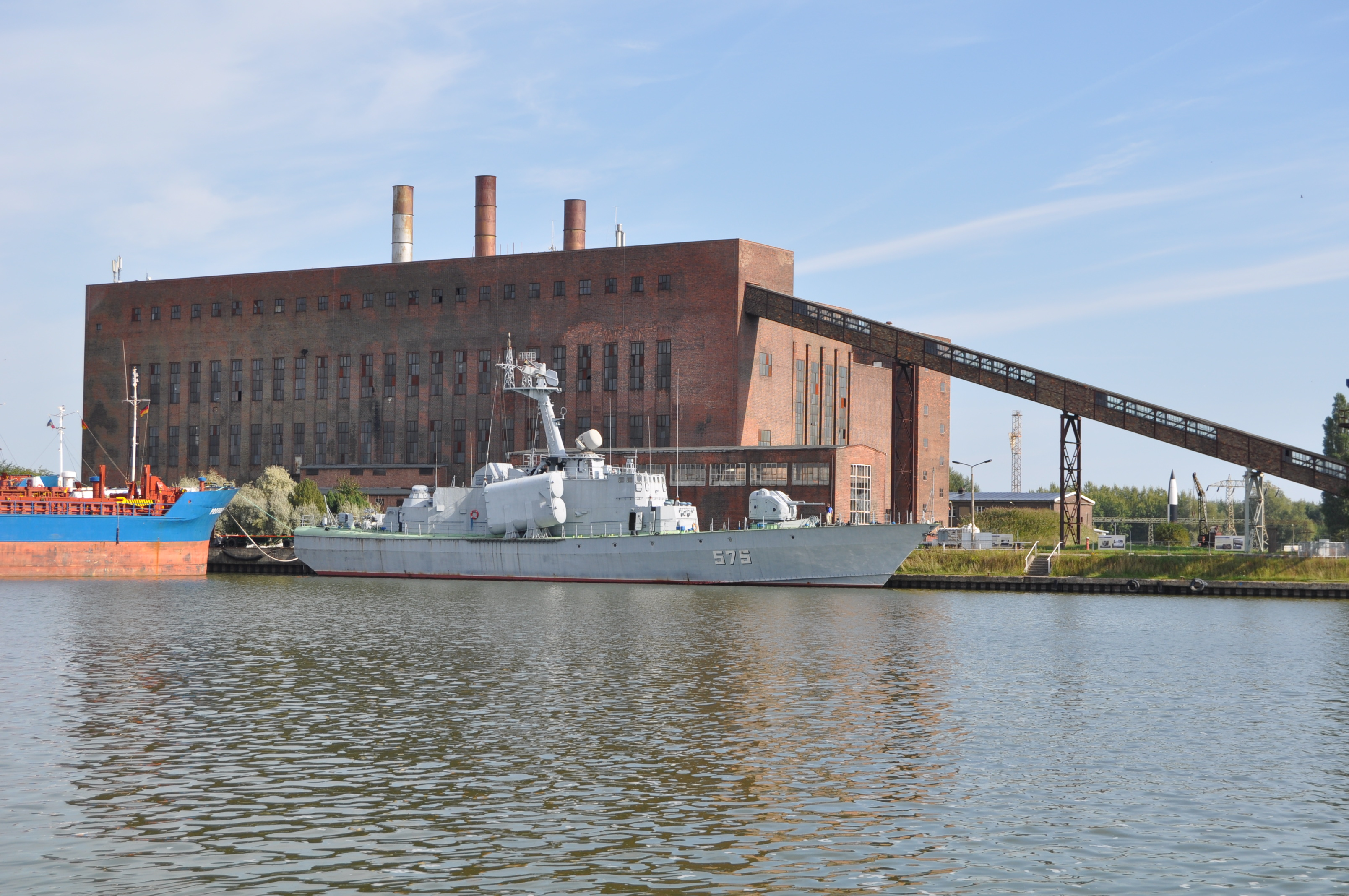 Kraftwerk Peenemünde vom Wasser aus